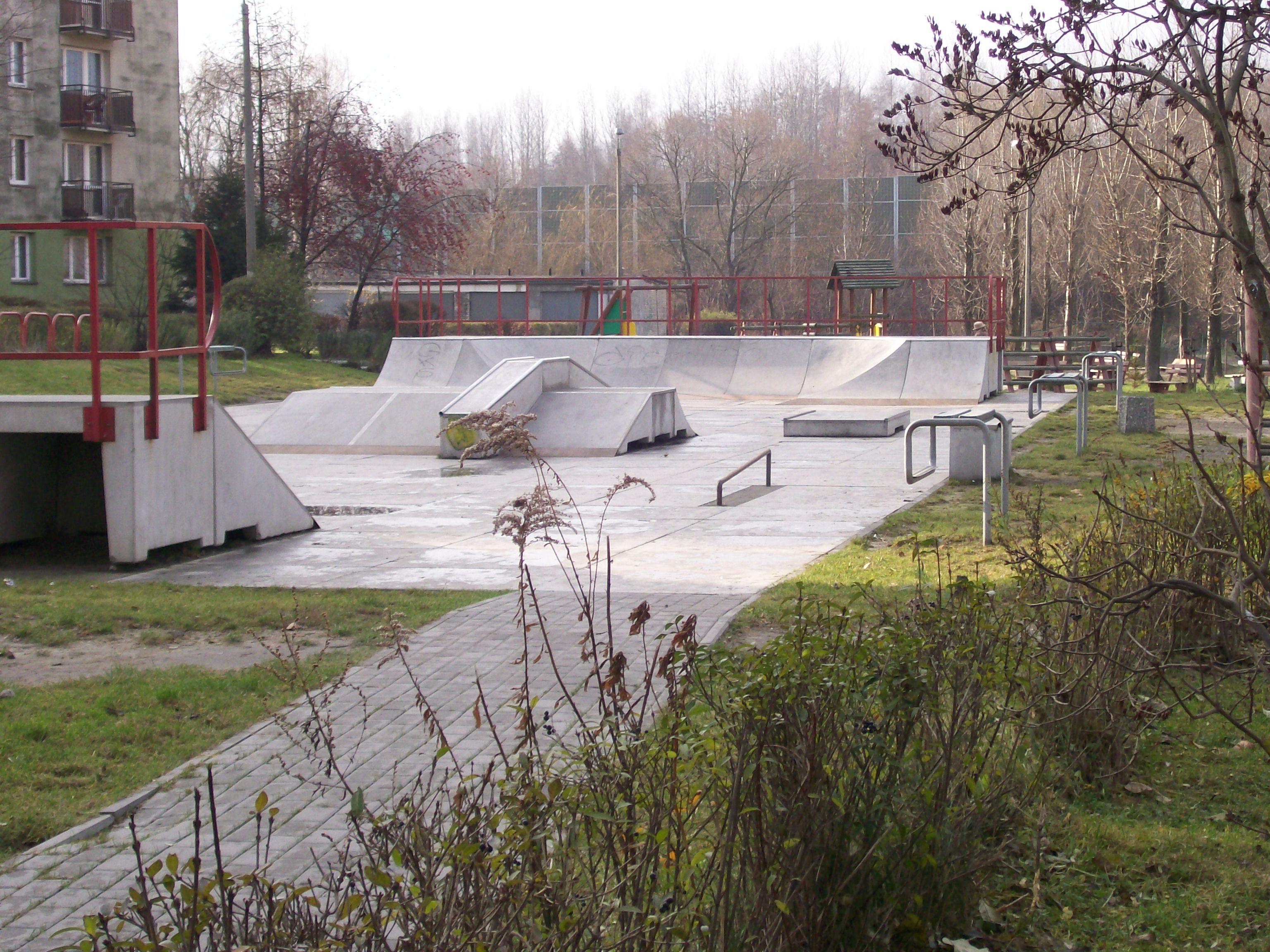 description: Giszowiec skatepark - ulica Mysłowicka, Ewkaa